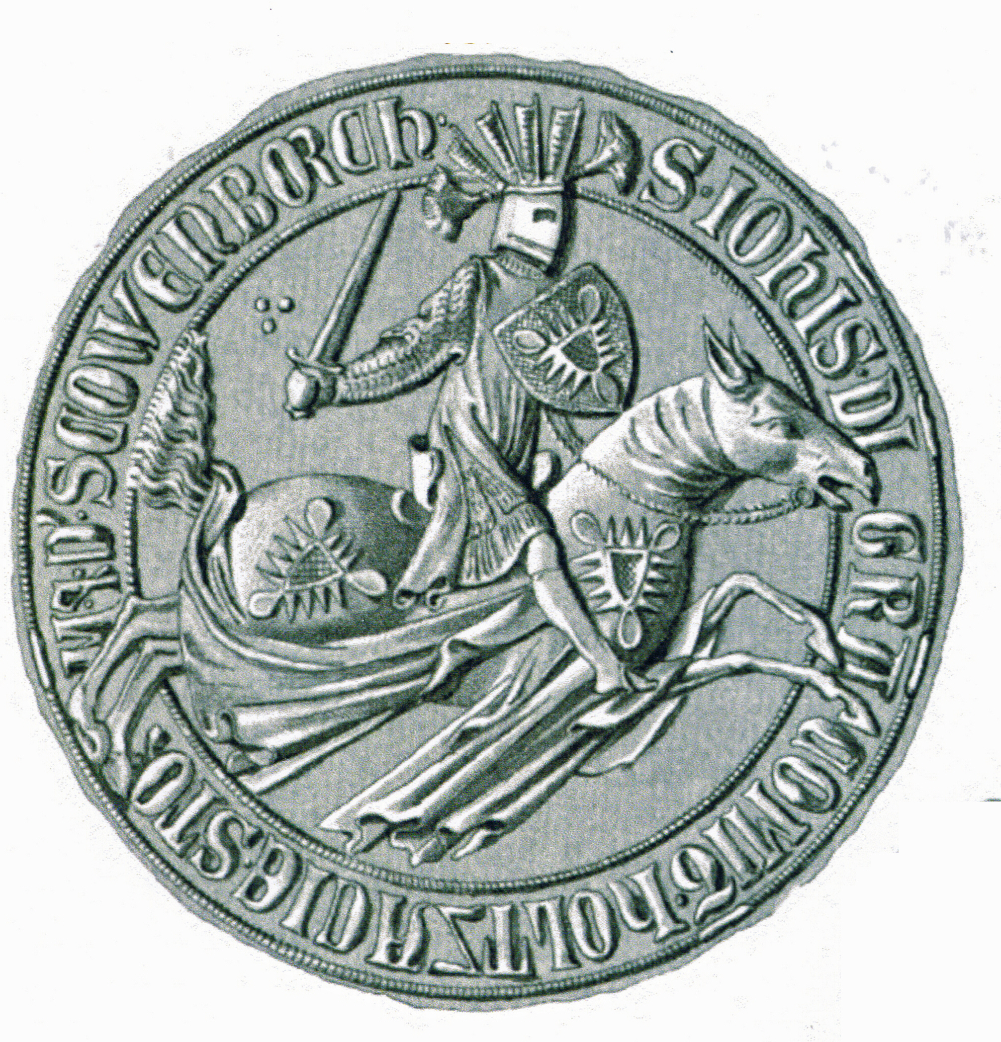 Siegel des Johann III. der Milde (* ca. 1297; † 27. September 1359), Graf von Holstein-Kiel (1316–1359) und Graf von Holstein-Plön (1350–1359). Das Siegel stammt aus der Zeit um 1319-1357.